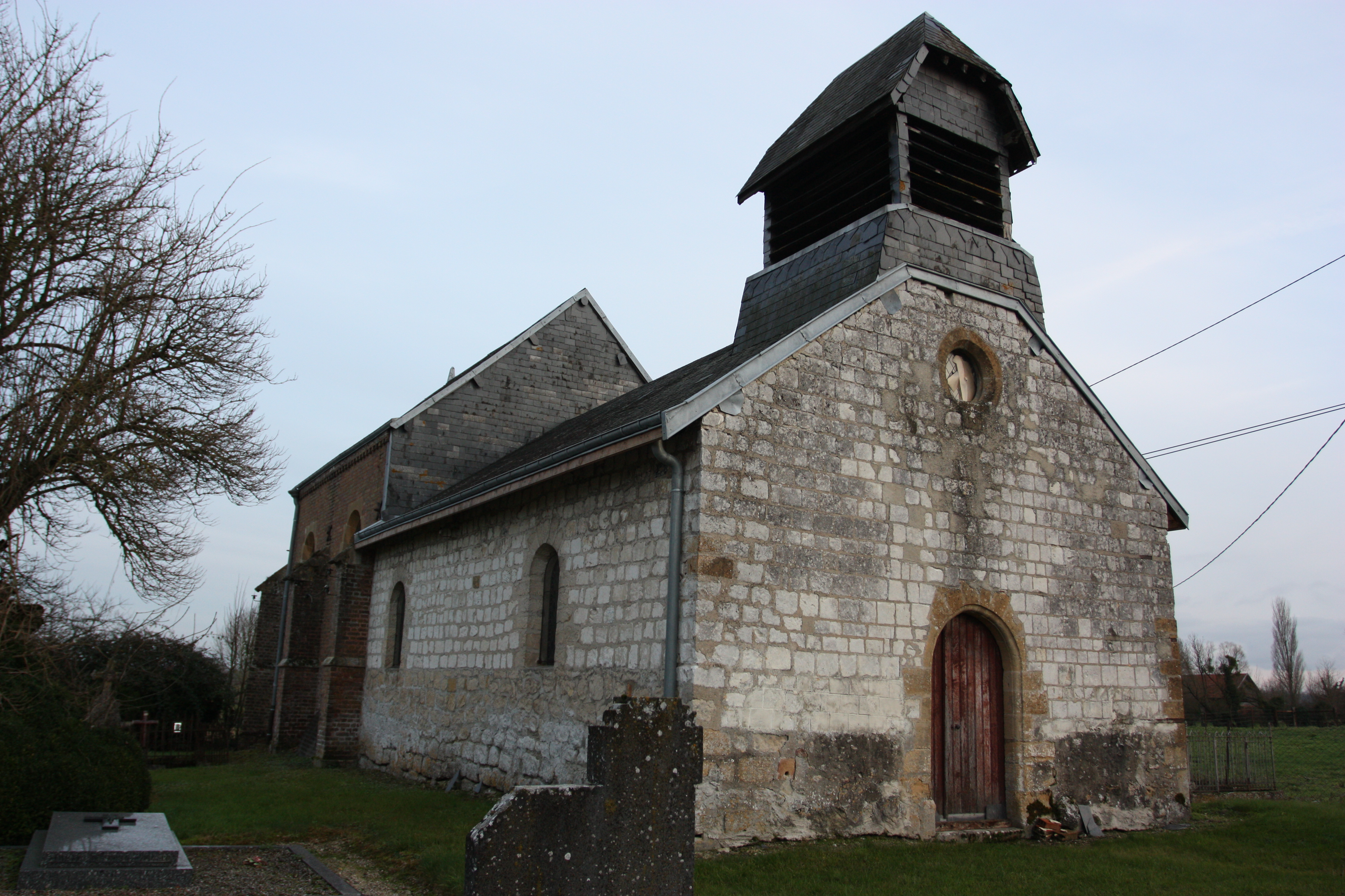 Village Ardennais